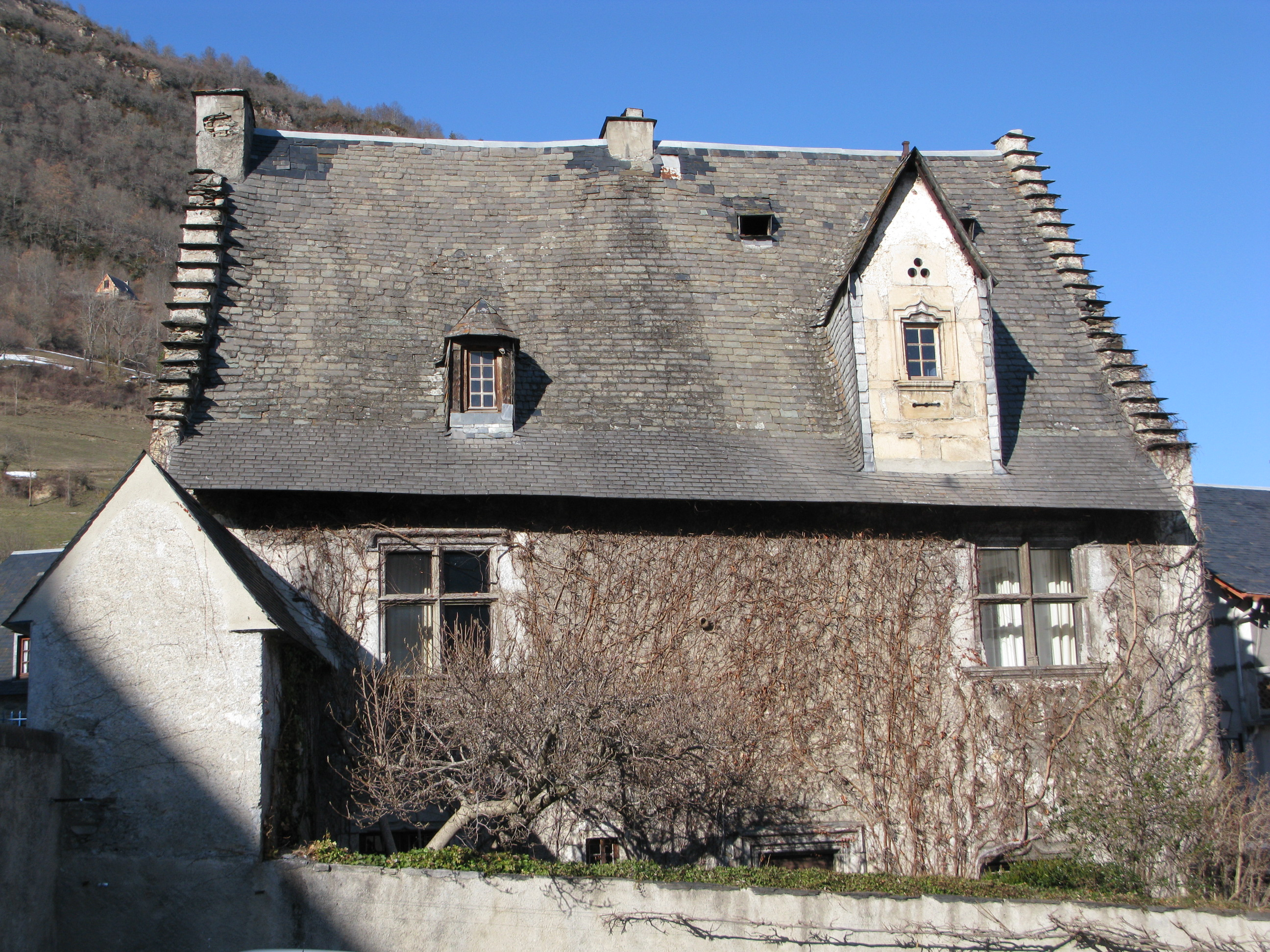 Maison du 16ème siècle sur la place de l'église d'Ancizan.